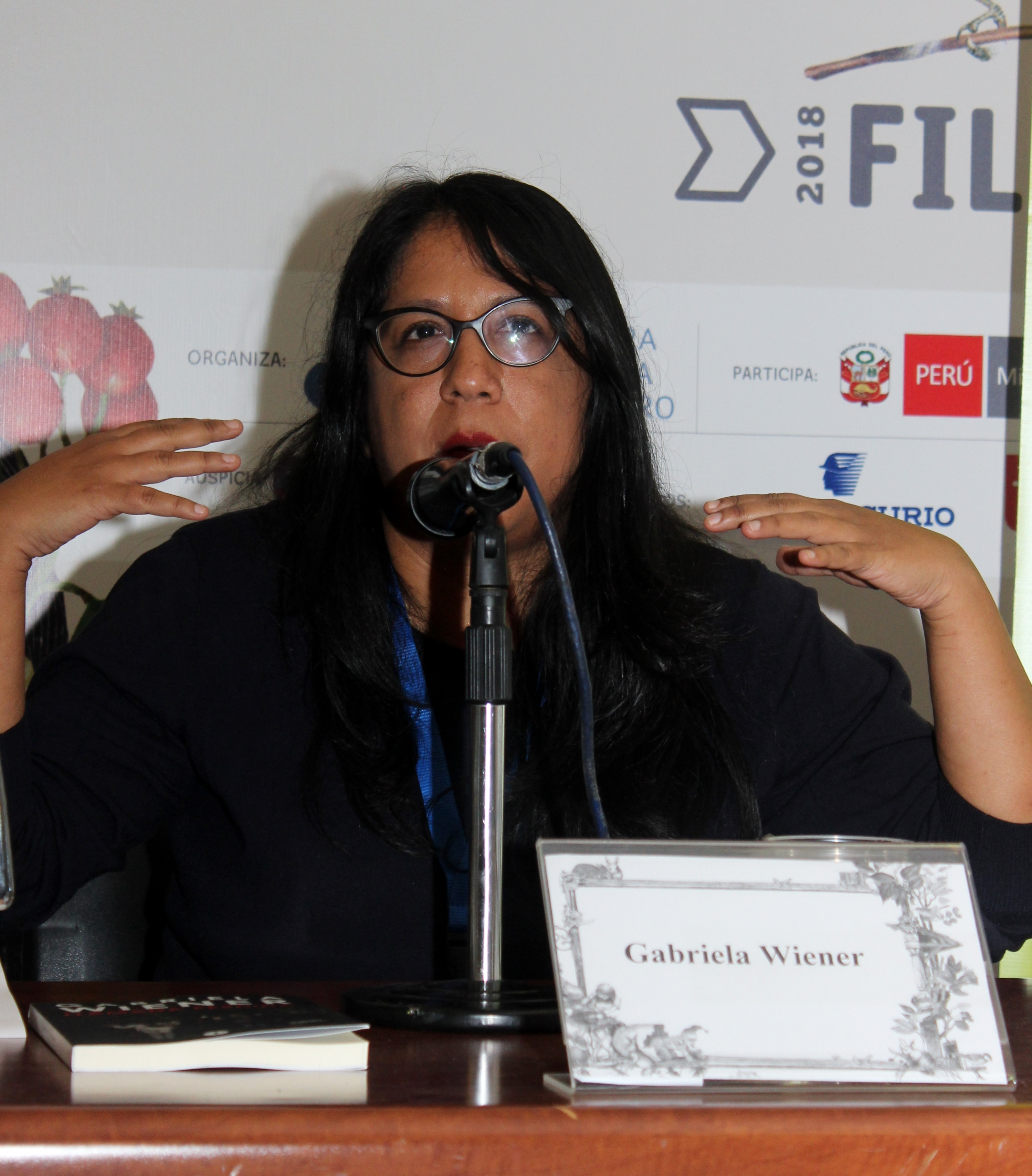 La escritora y periodista peruana Gabriela Wiener en la Feria Internacional del Libro de Santiago 2018